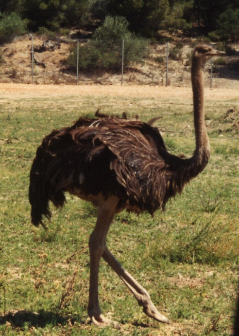 Une autruche